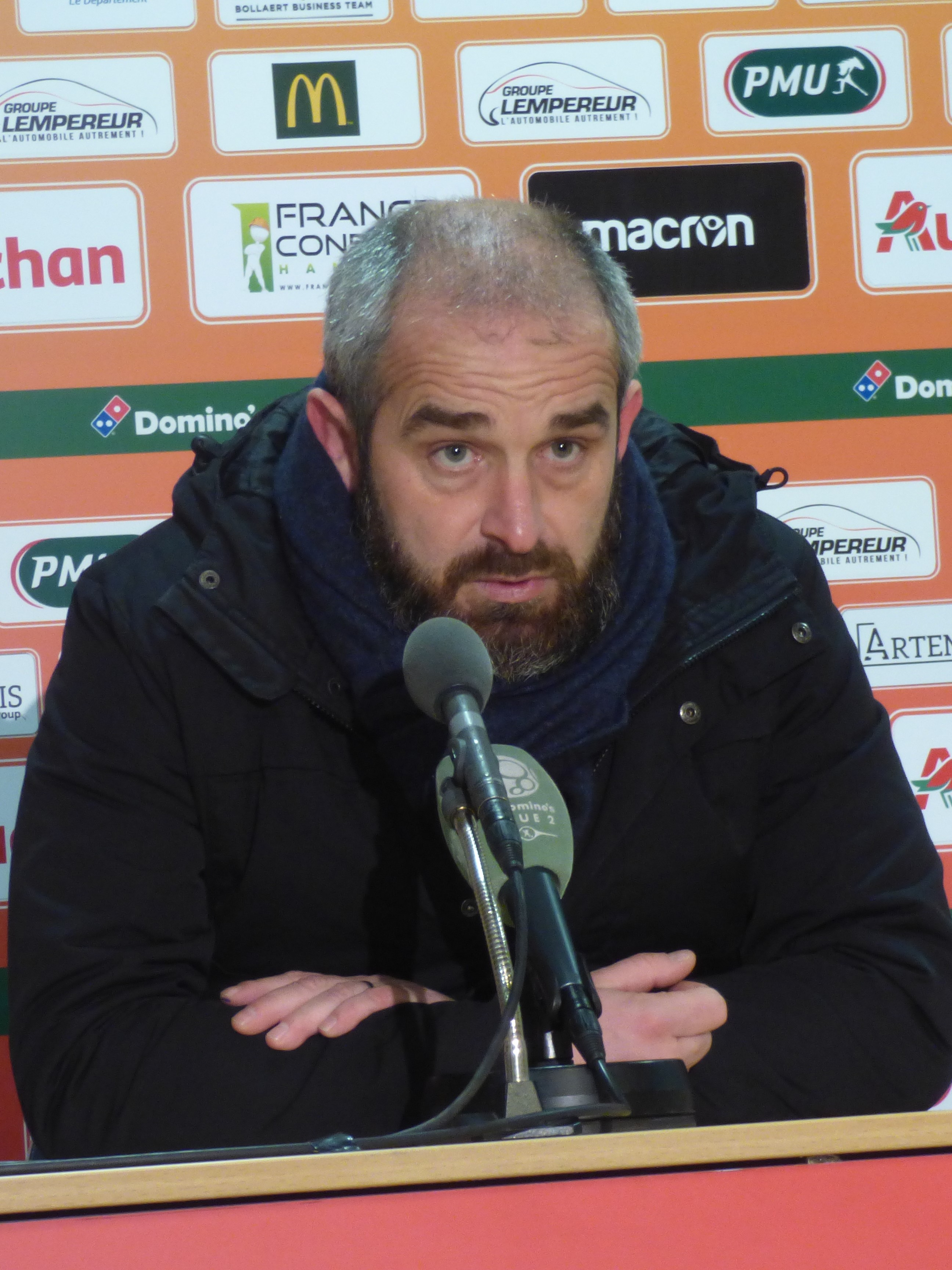 Mathieu Chabert après le match RC Lens / AS Béziers, comptant pour la 23ème journée du championnat de France de football de Ligue 2 2018-2019, le 4 février 2019, au Stade Bollaert-Delelis.